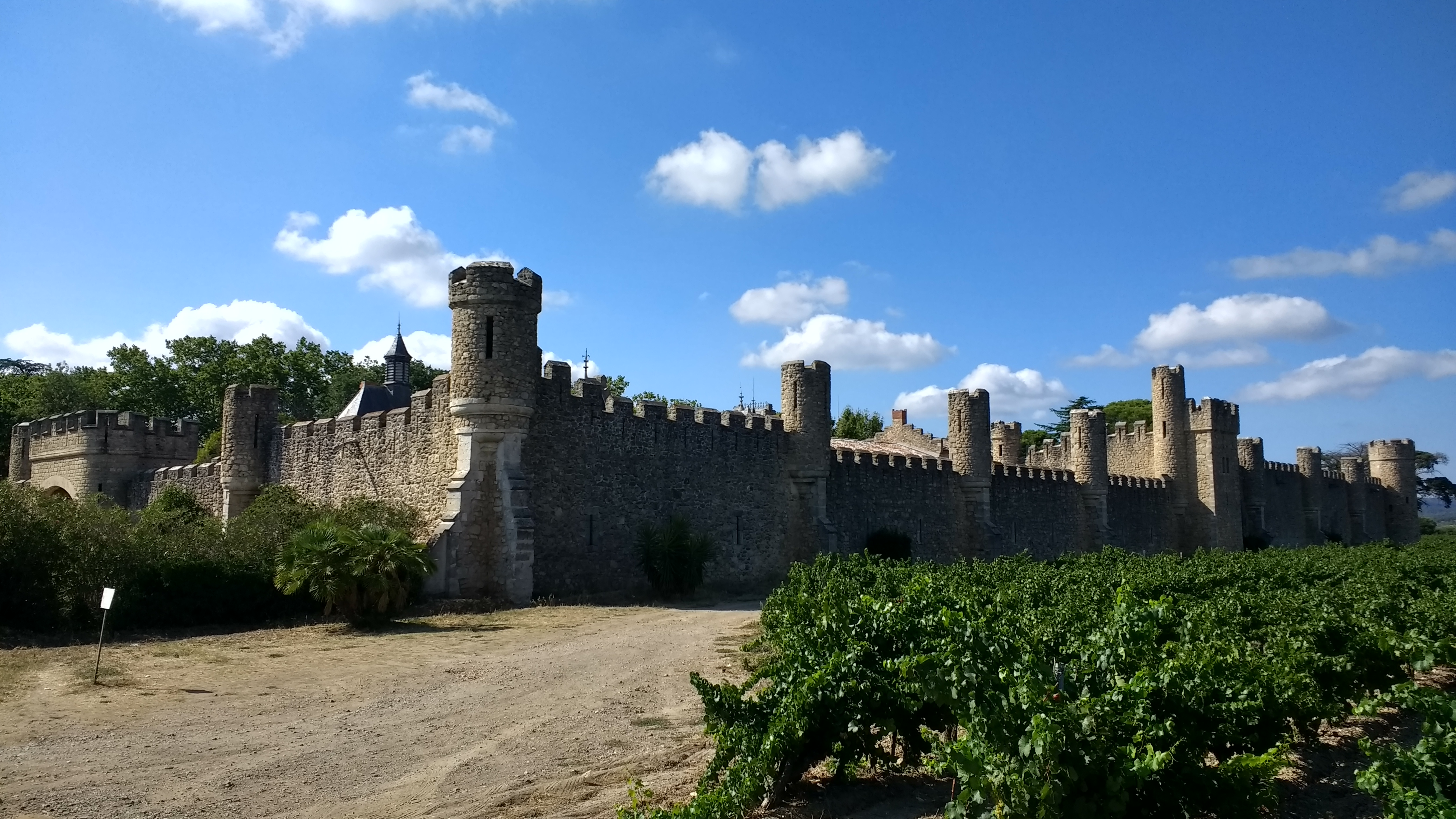 Muraille autour du château de Grézan à Laurens